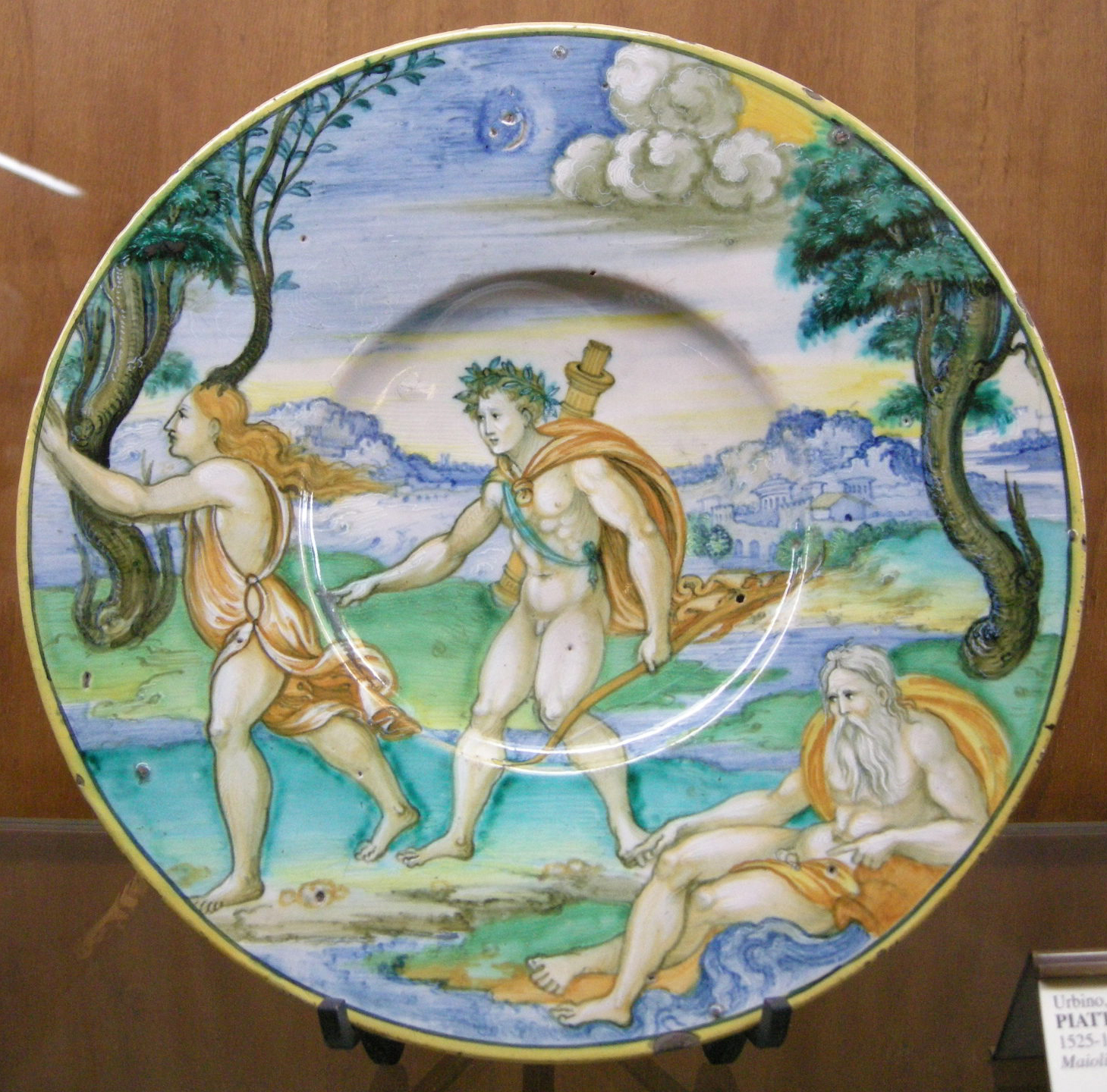 C.sf., urbino, nicola da urbino (attr.), piatto con apollo e dafne, 1525-1535 circa